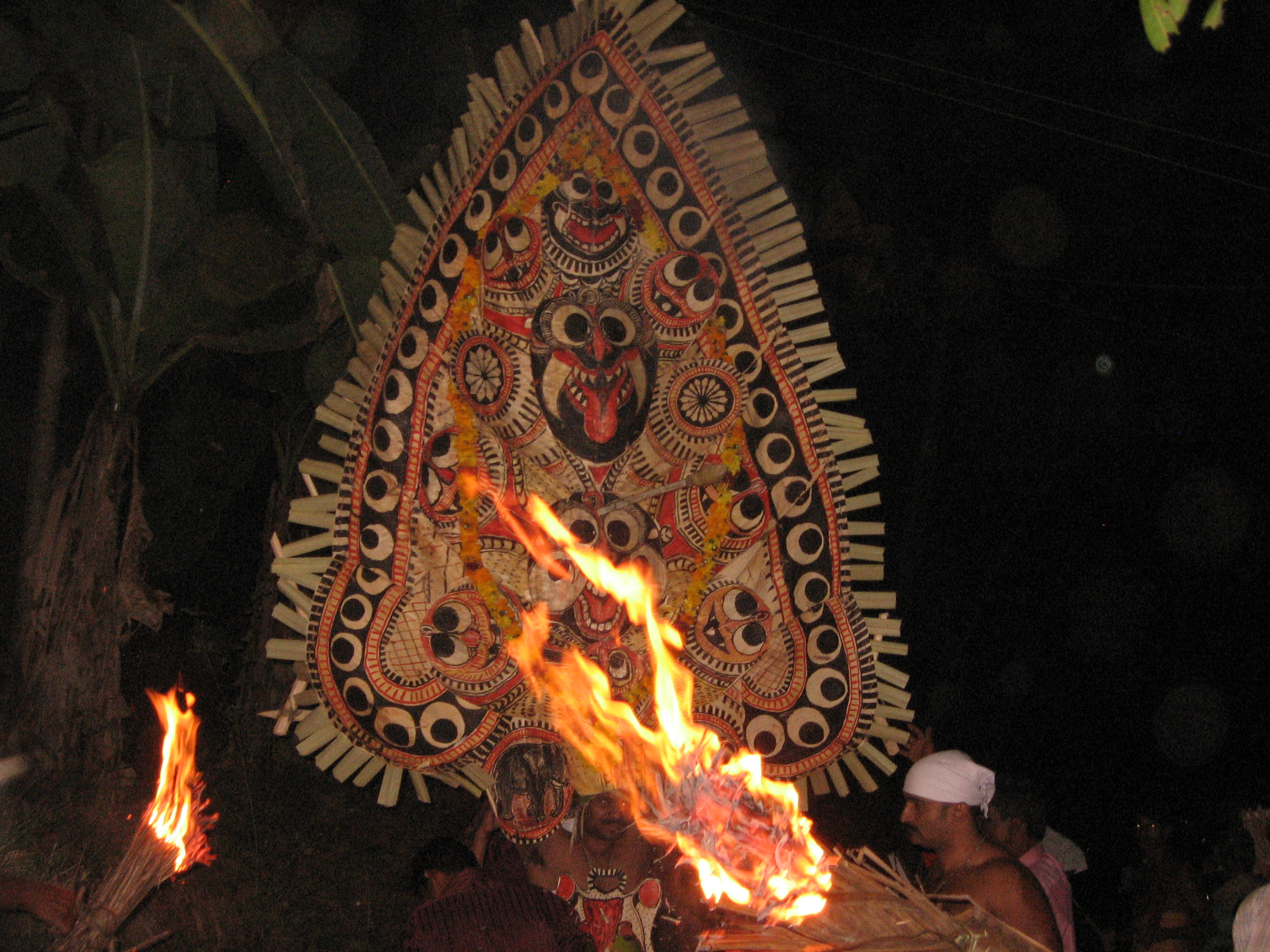 ഭൈരവിക്കോലം, താഴൂർ ഭഗവതീക്ഷേത്രത്തിലേത്